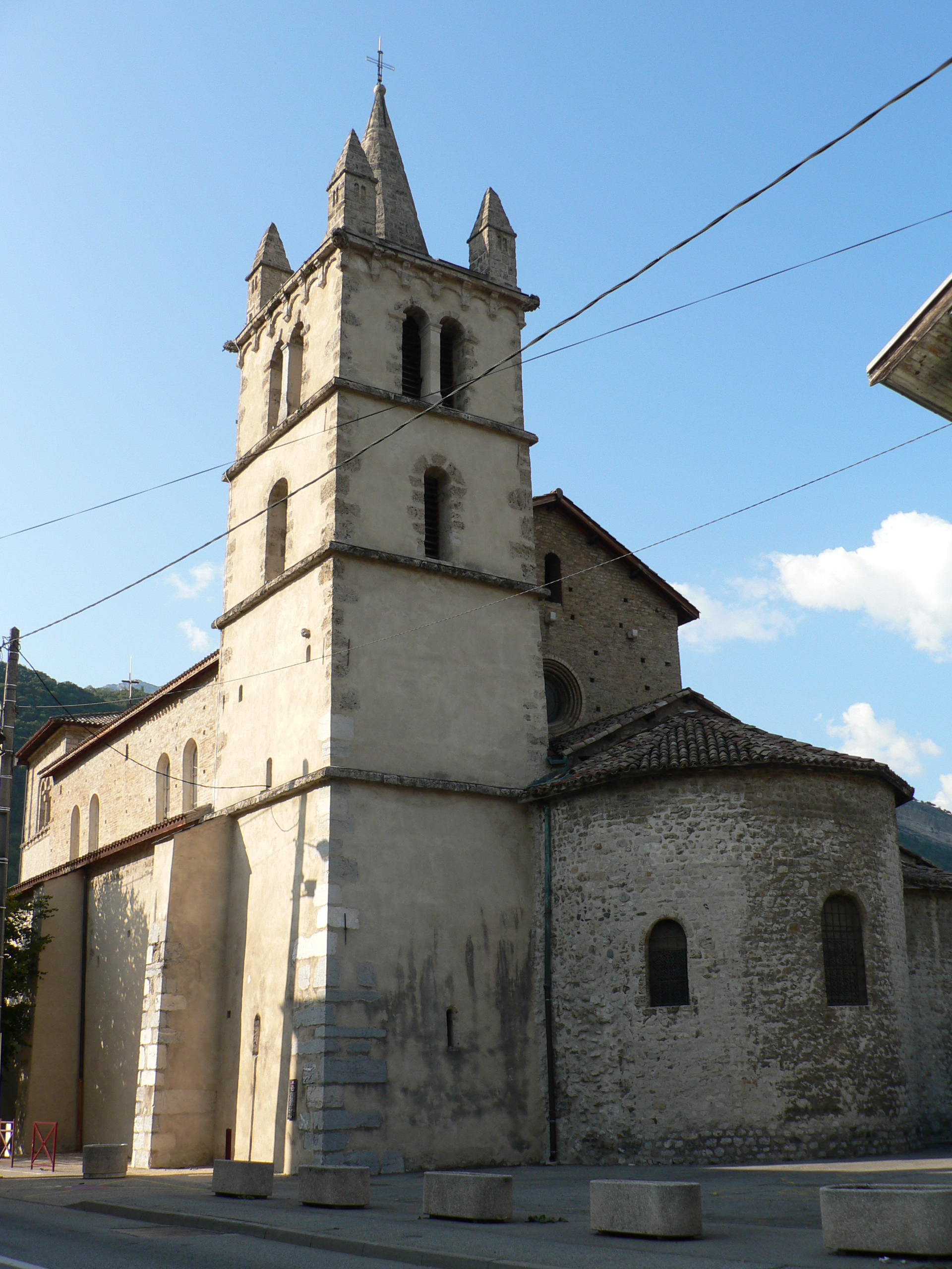 Église Saint-Jean-Baptiste à Vif